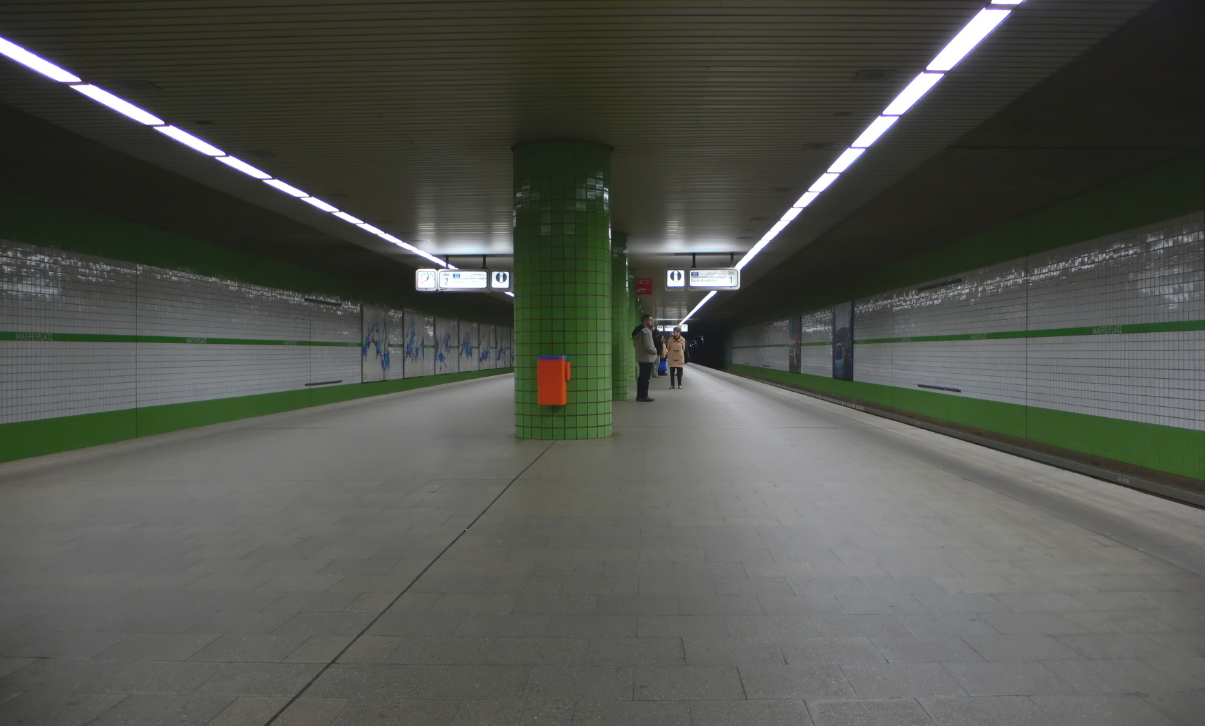 U-Bahnhof Maffeiplatz der U-Bahn Nürnberg, Bahnsteigebene, Blick von Süden